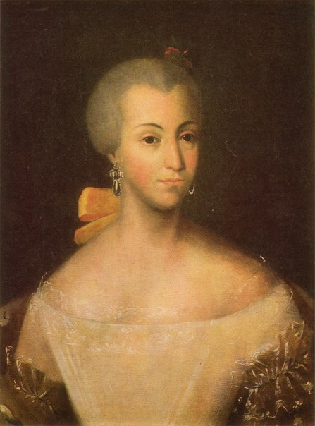 Меншикова Елизавета Петровна (1721—1764), ур. Голицына, супруга св.кн. Александра Александровича Меншикова (1714-1764).